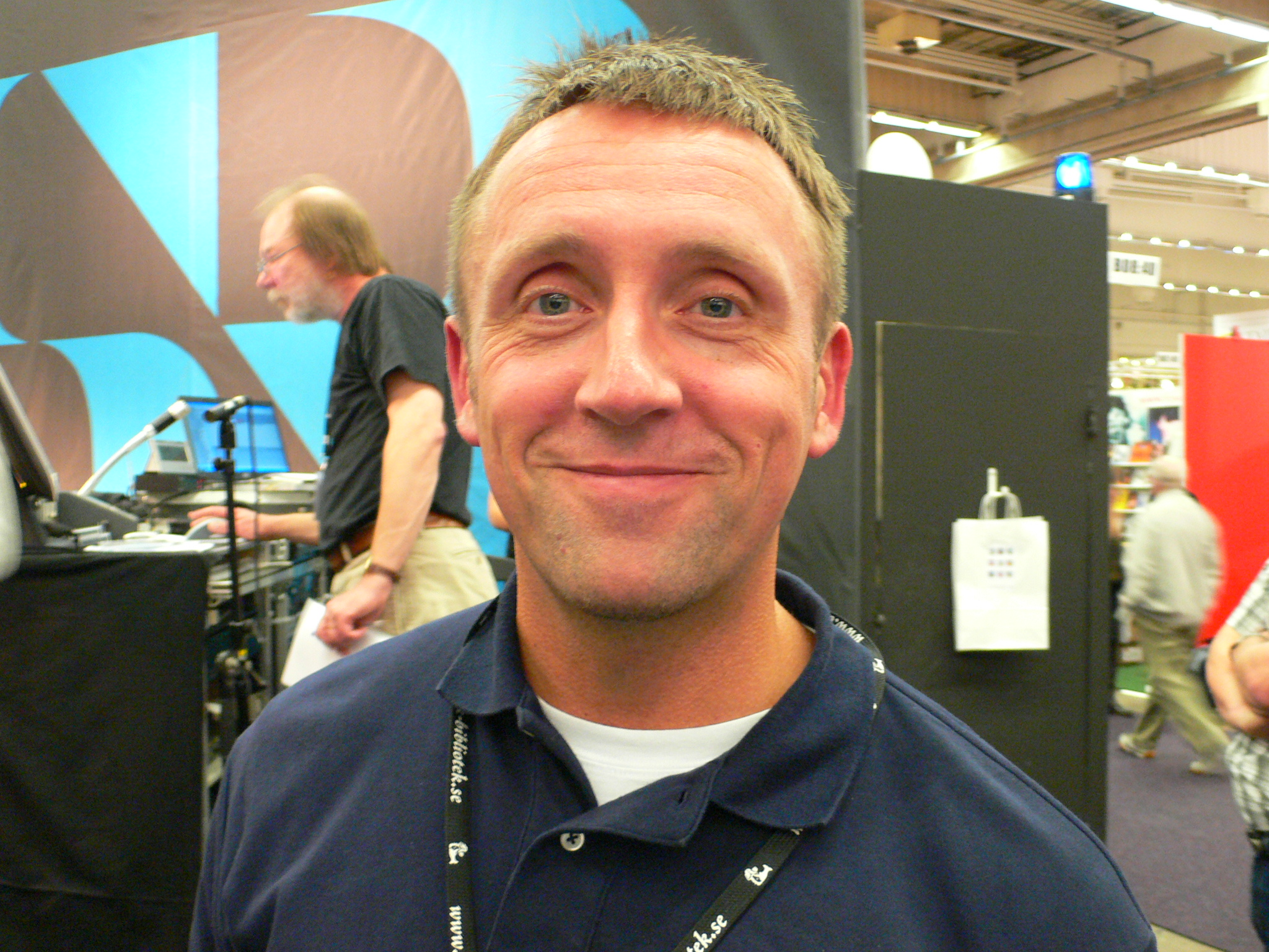 Göran Everdahl at Gothenburg Book Fair 2007, Göran Everdahl på Bok- och biblioteksmässan 2007